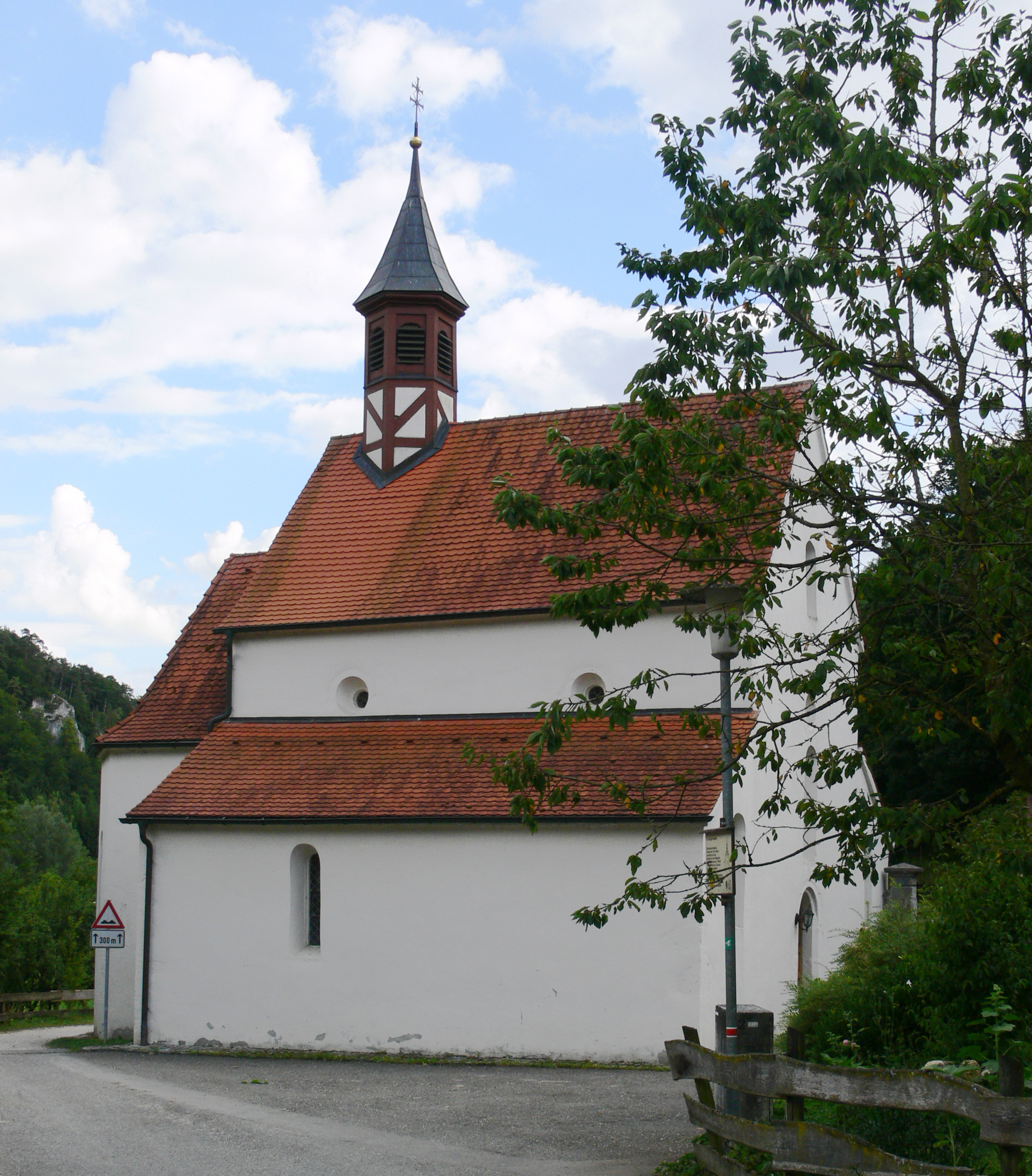 Kapelle St. Georg, Thiergarten, Gemeinde Beuron, Landkreis Sigmaringen